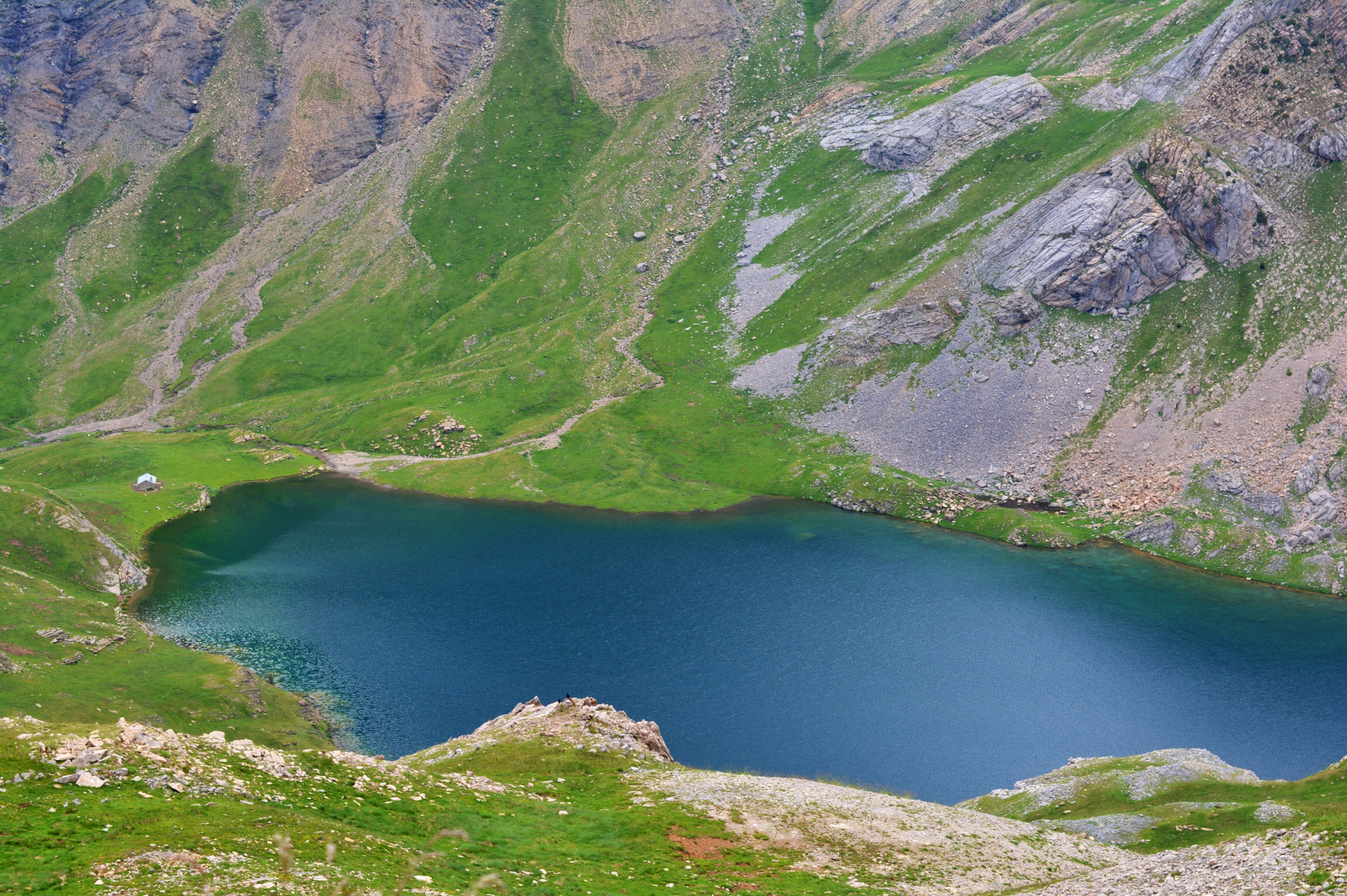 Ibón de Sabocos